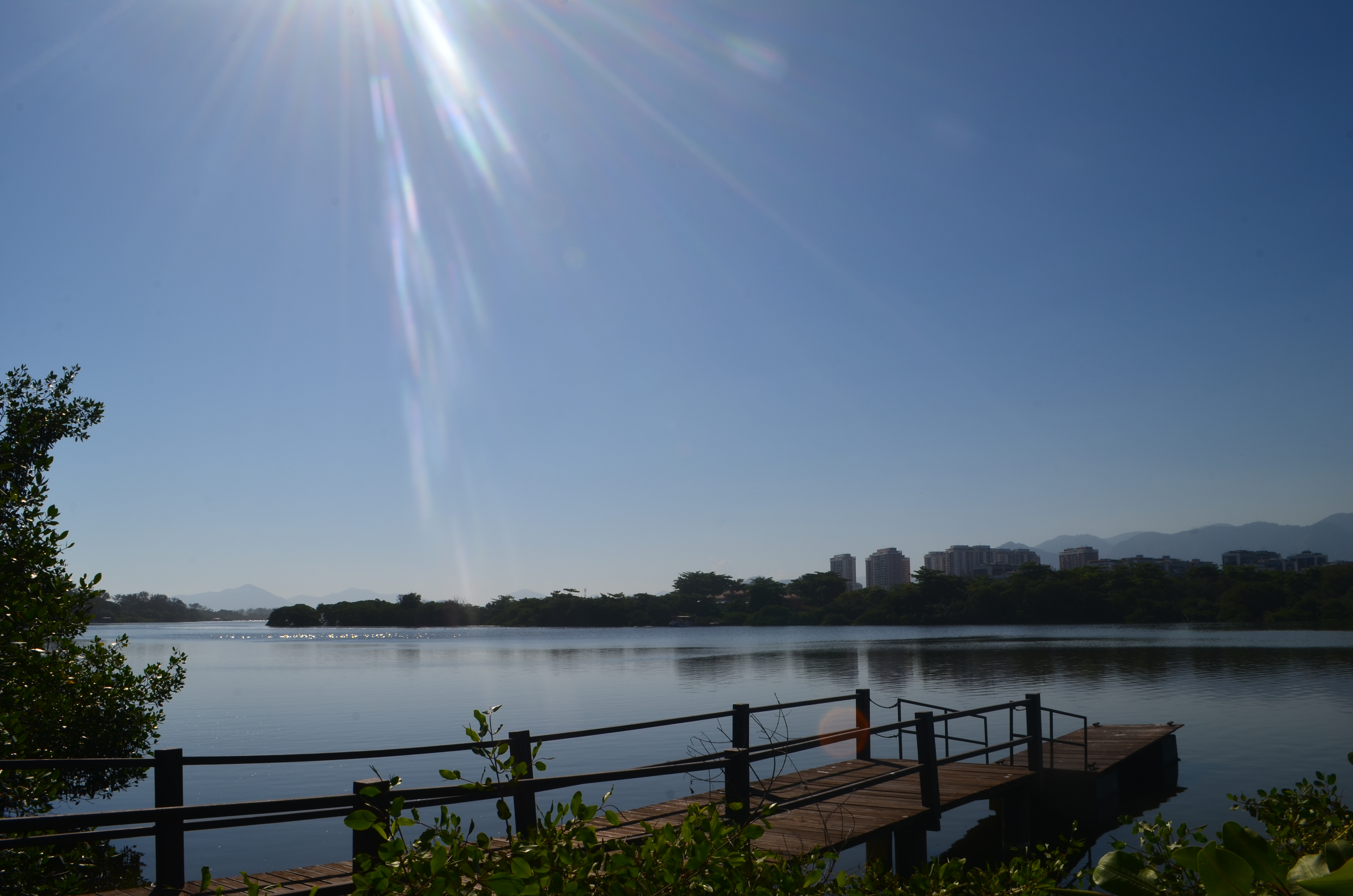 Vista da Reserva de Marapendi